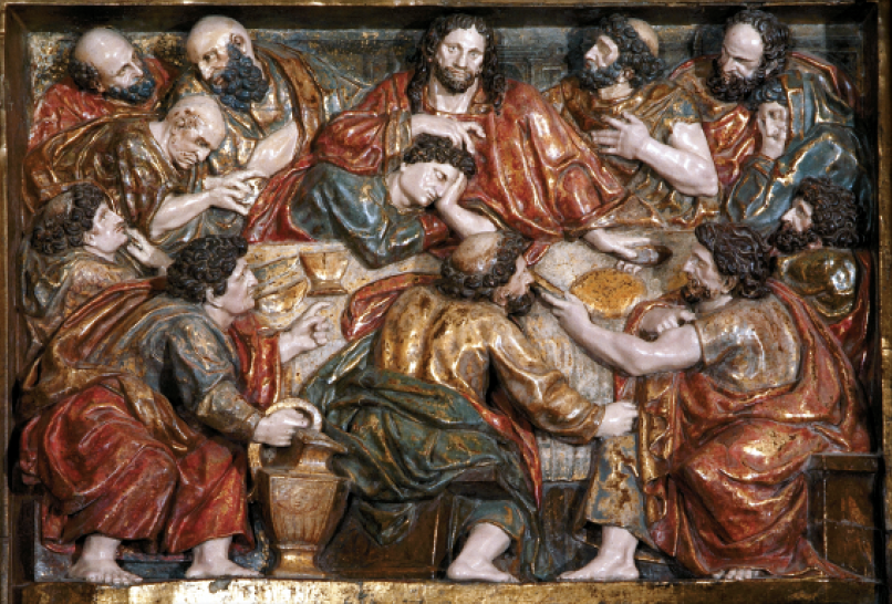 Etxarrentxuloko elizako erretaularen xehetasuna1